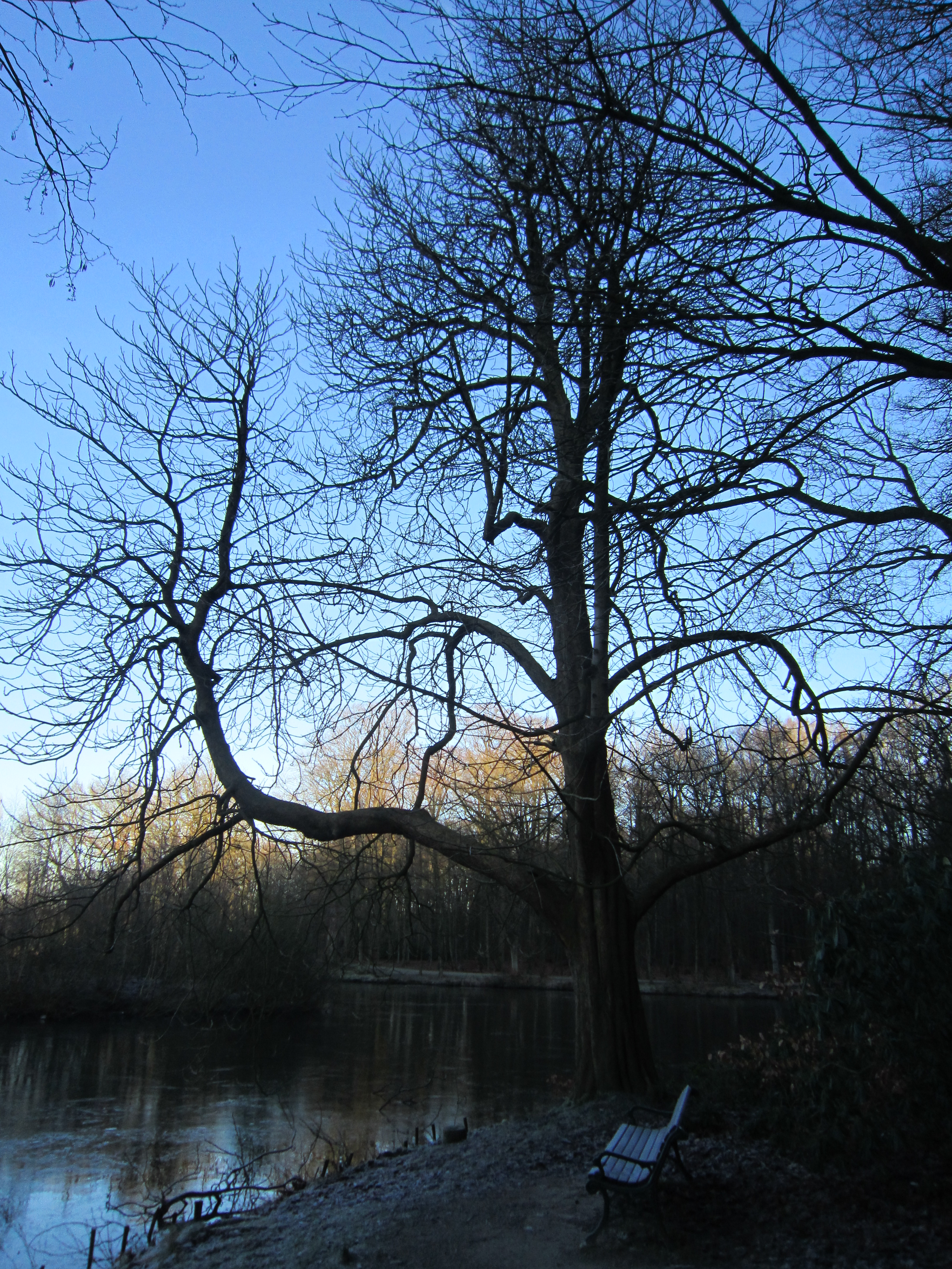 Eines von mehreren Naturdenkmalen des Landkreises Ammerland am Rundweg von der Oldenburger Straße um den Ellernteich herum